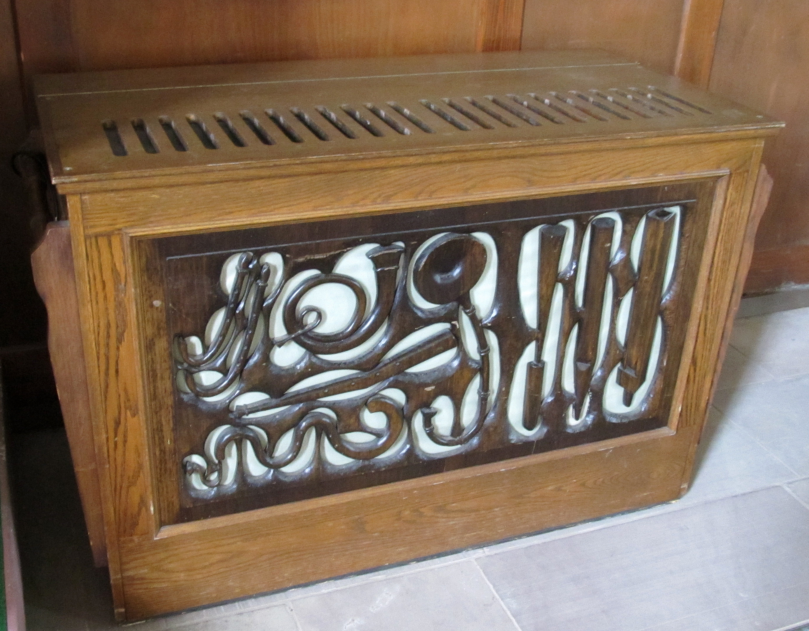 Truhenorgel in der protestantischen Christuskirche in Mimbach, einem Stadtteil von Blieskastel, Saarland